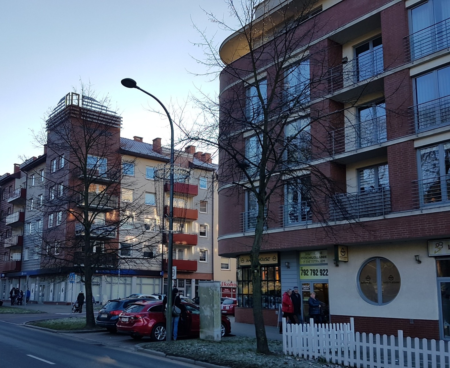 Miejsce byłej siedziby Spójni Czarnieckiego 4